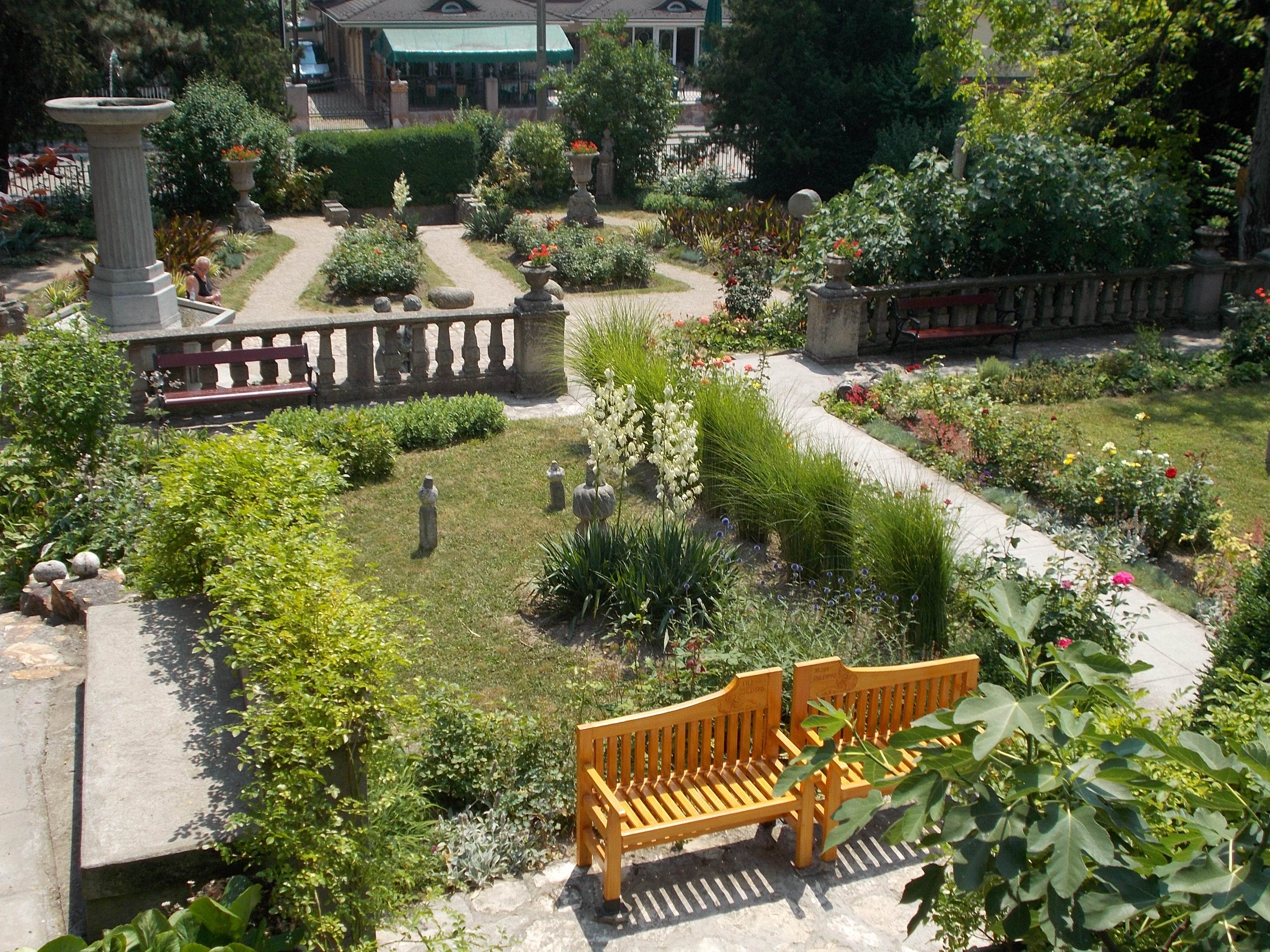 Bory vár. Kert beton díszkúttal. - Magyarország, Fejér megye, Székesfehérvár, Öreghegy, Máriavölgy út 54